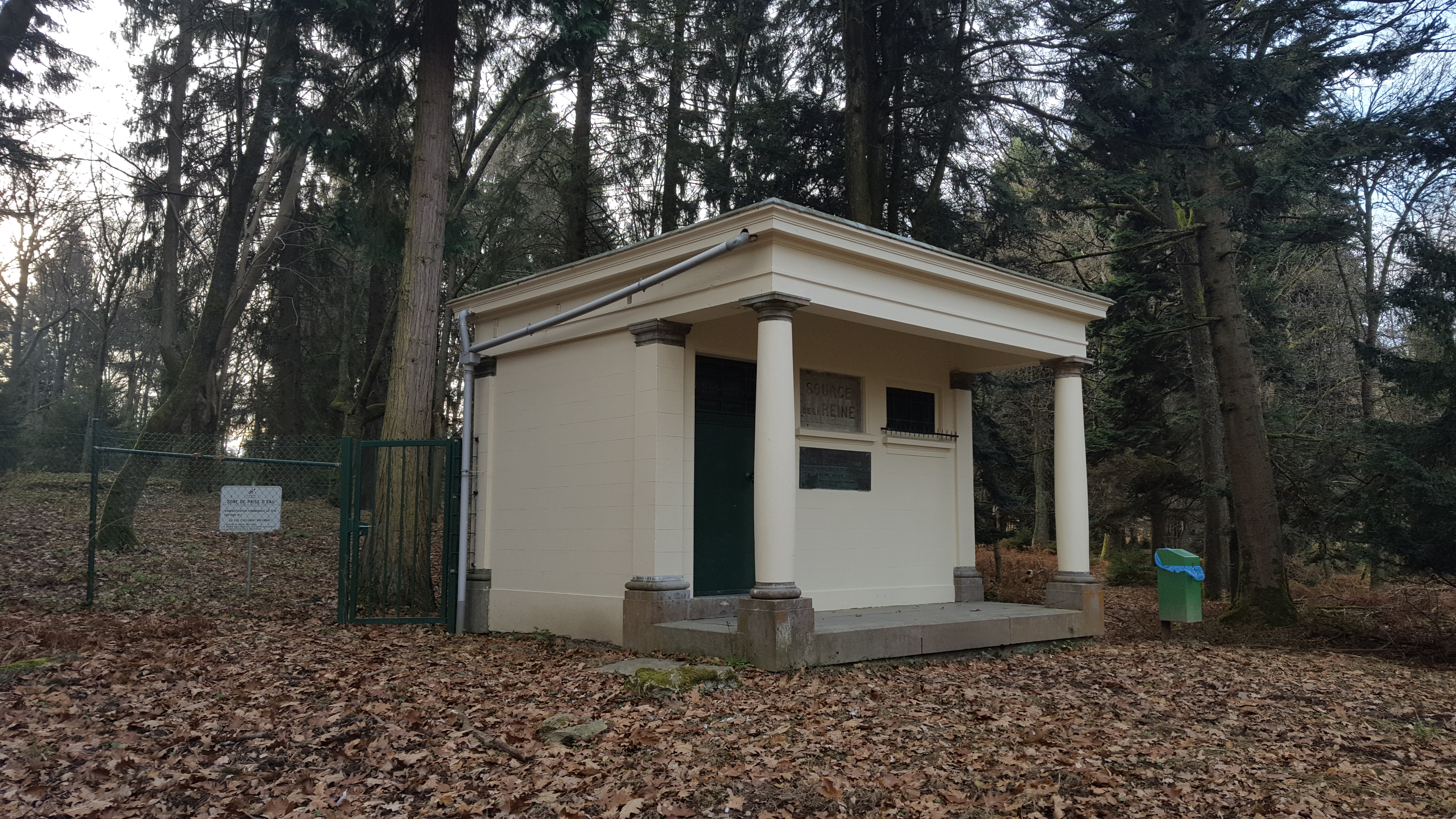 Source de la Reine, Spa, Belgique